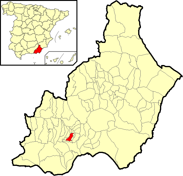 Situación del término municipal de Huécija respecto a la provincia de Almería, en España.